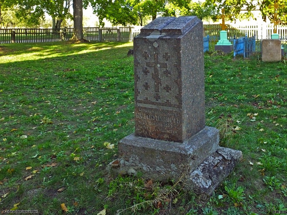 Субаты. Свята-Раства-Багародзіцкая царква. Надмагілле